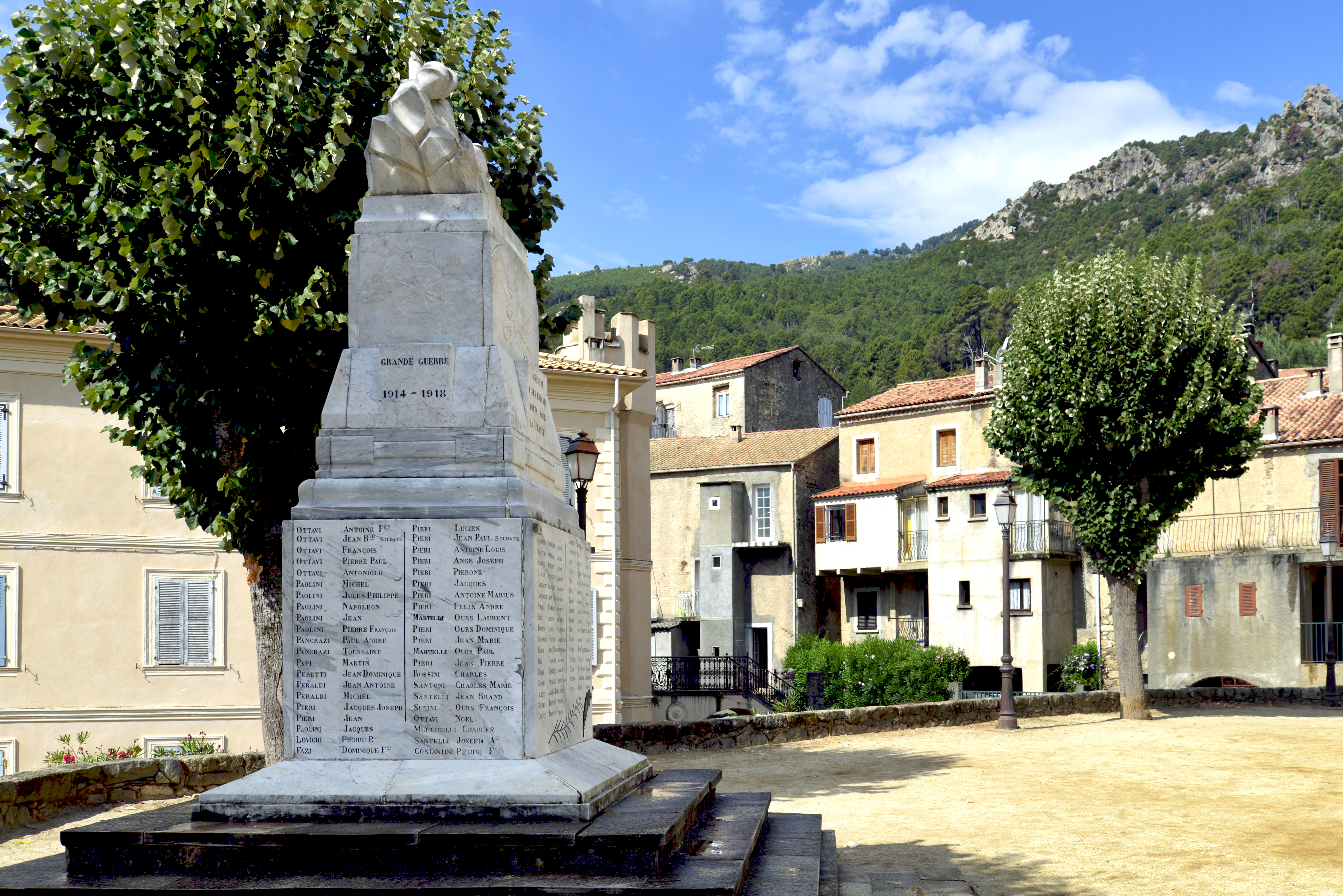 Ghisoni, Fiumorbo (Haute-Corse) - Monument aux morts sur la place Seratu.